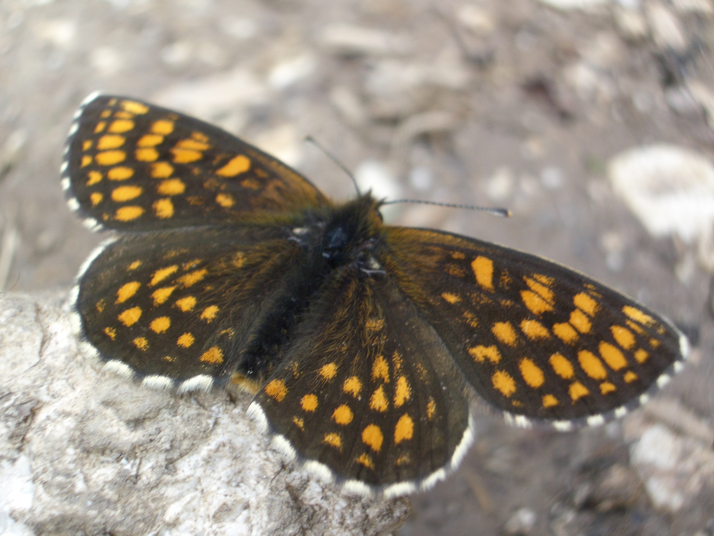 Melitaea diamina Julian Alps Slovenia